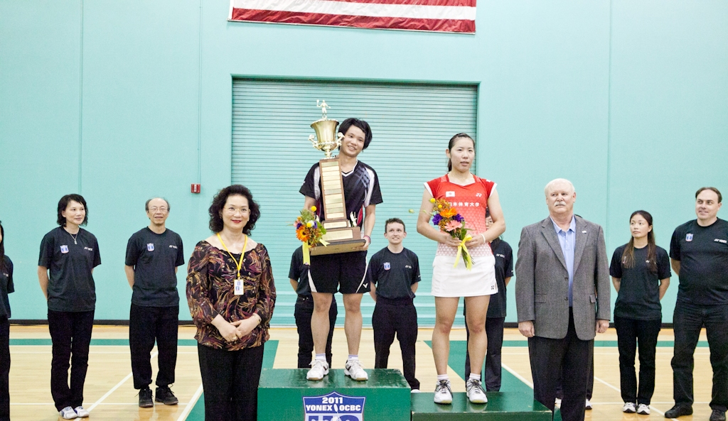 2011 US Open Badminton